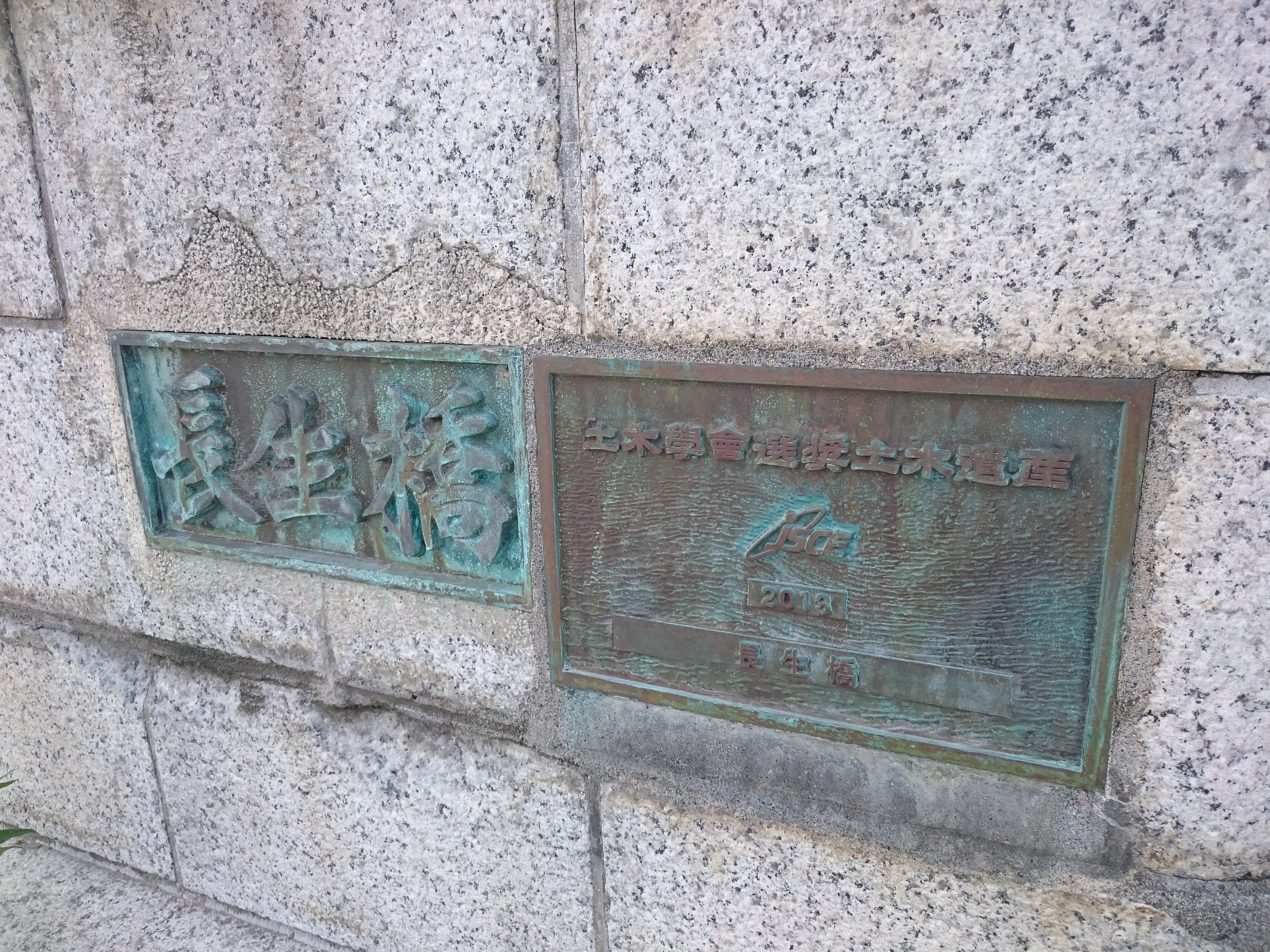 長生橋の銘板・2013年設置の土木学会選抜土木遺産の表示